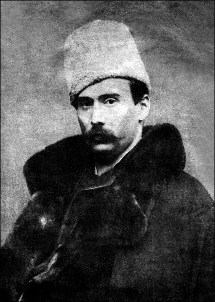 Микола Садовський у кінці 1880-х